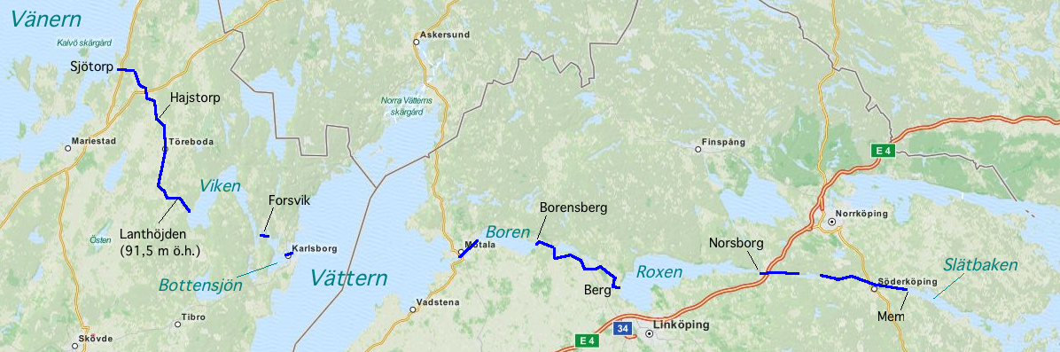 Göta kanals sträckning (i blått), med kända platser utefter kanalen utmärkta – inklusive större sjöar, slussar och kanalens högsta punkt (Lanthöjden).